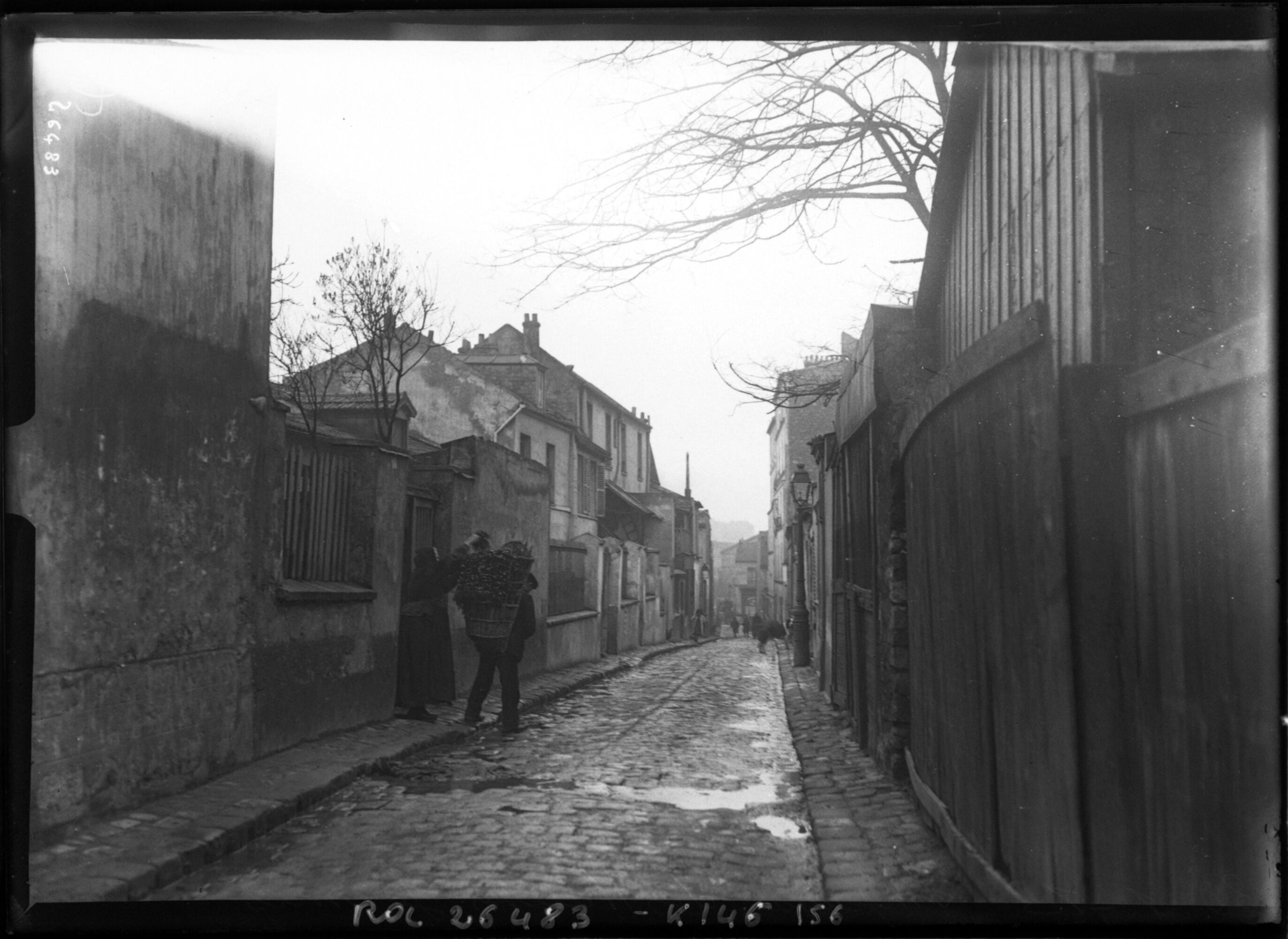 Impasse des Hautes-Formes (Paris XIIIe), 1913